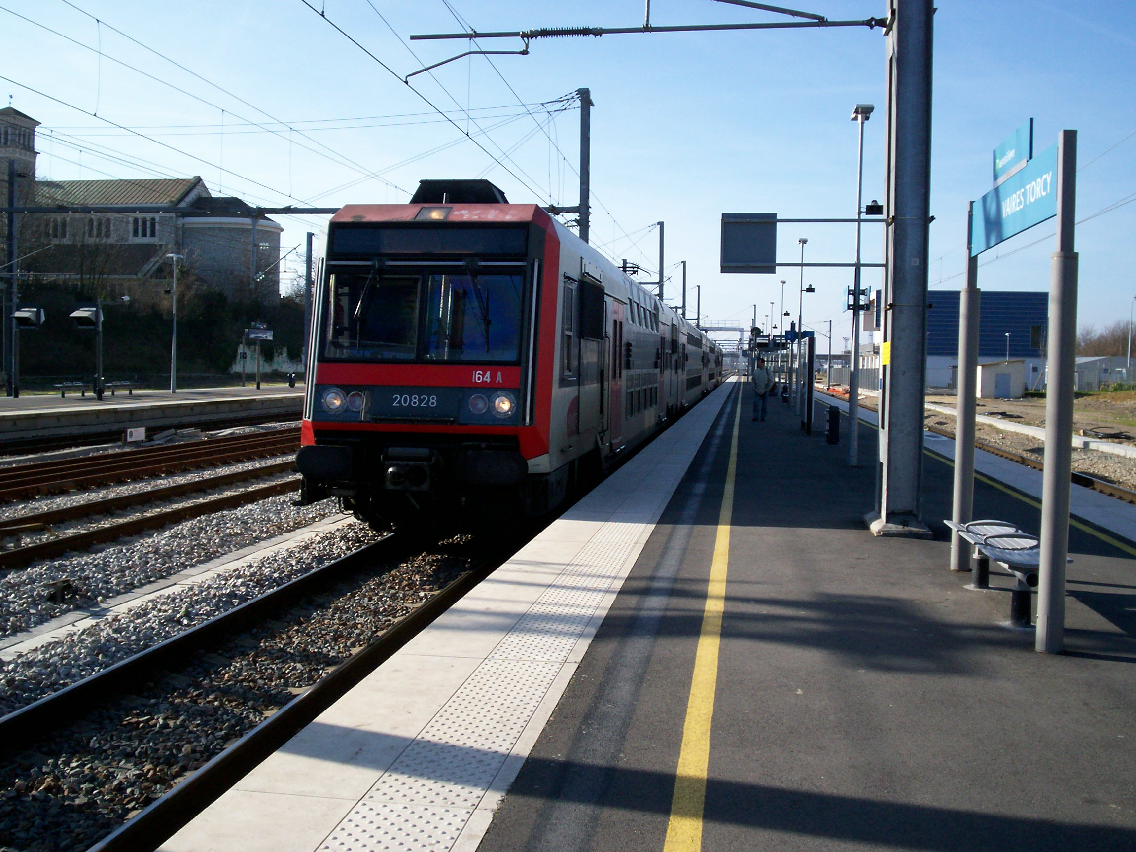 Train Meri à Vaires